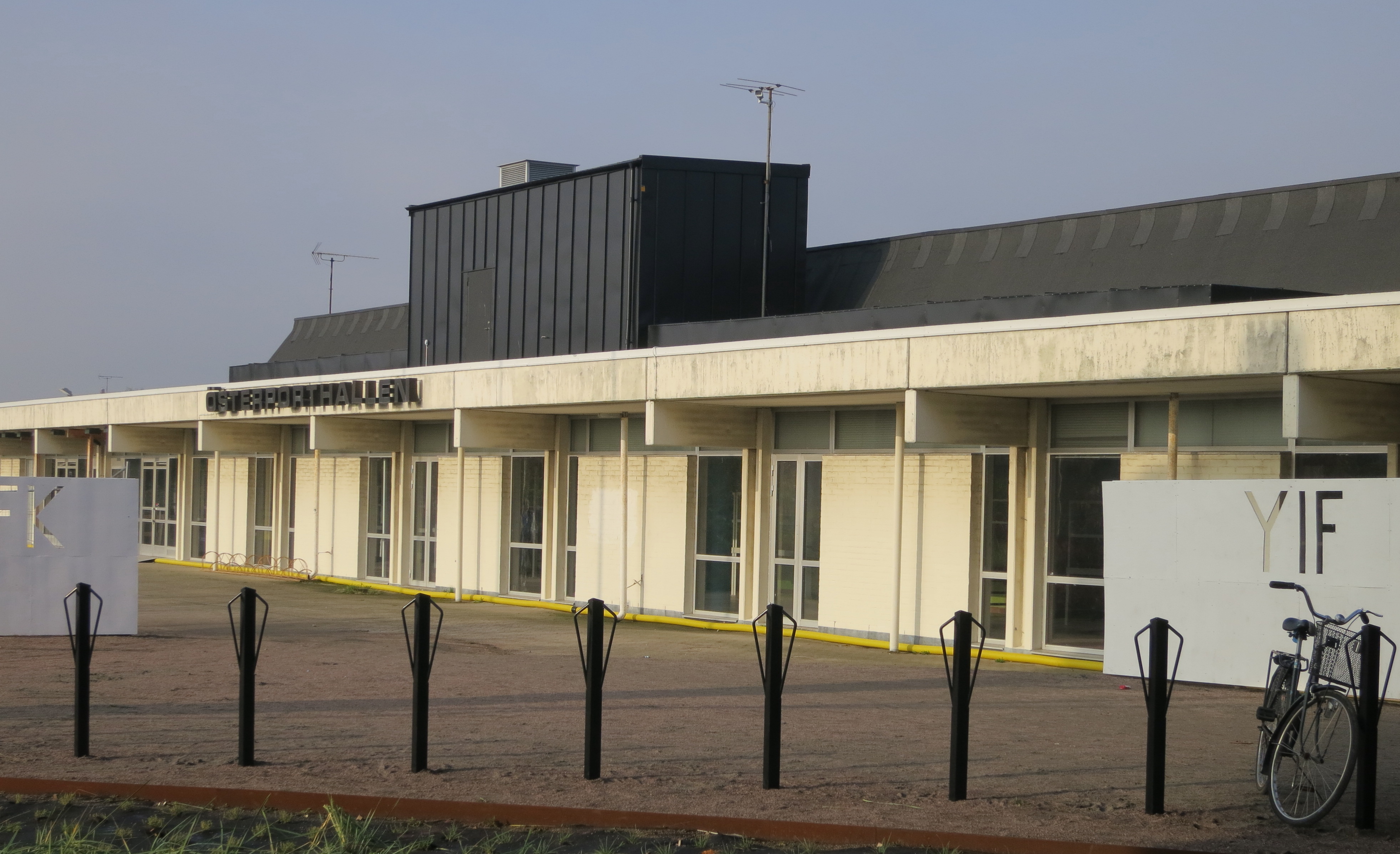 Österportshallen, Ystad